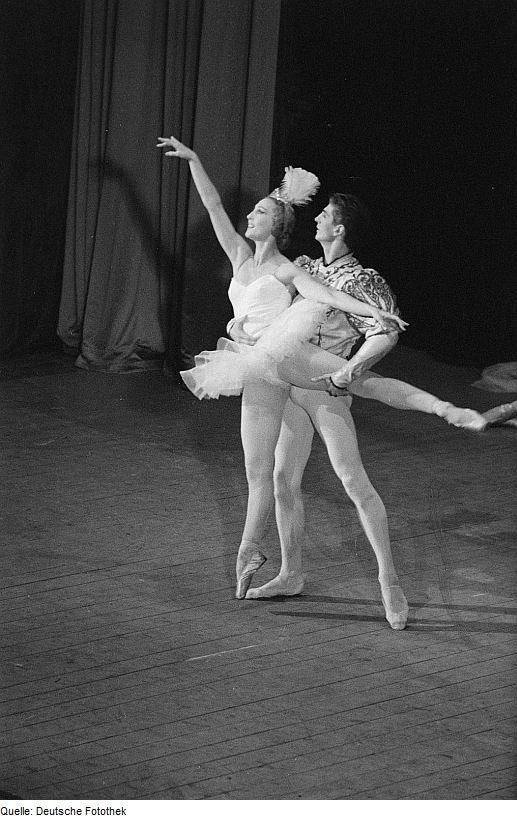 Original image description from the Deutsche Fotothek Gastaufführung "Die romantischen Ballette" des Ballettensembles der Pariser Oper im Capitol